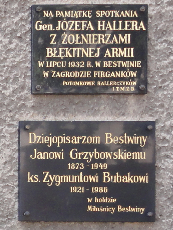 Tabliczki na ścianie muzeum w Bestwinie